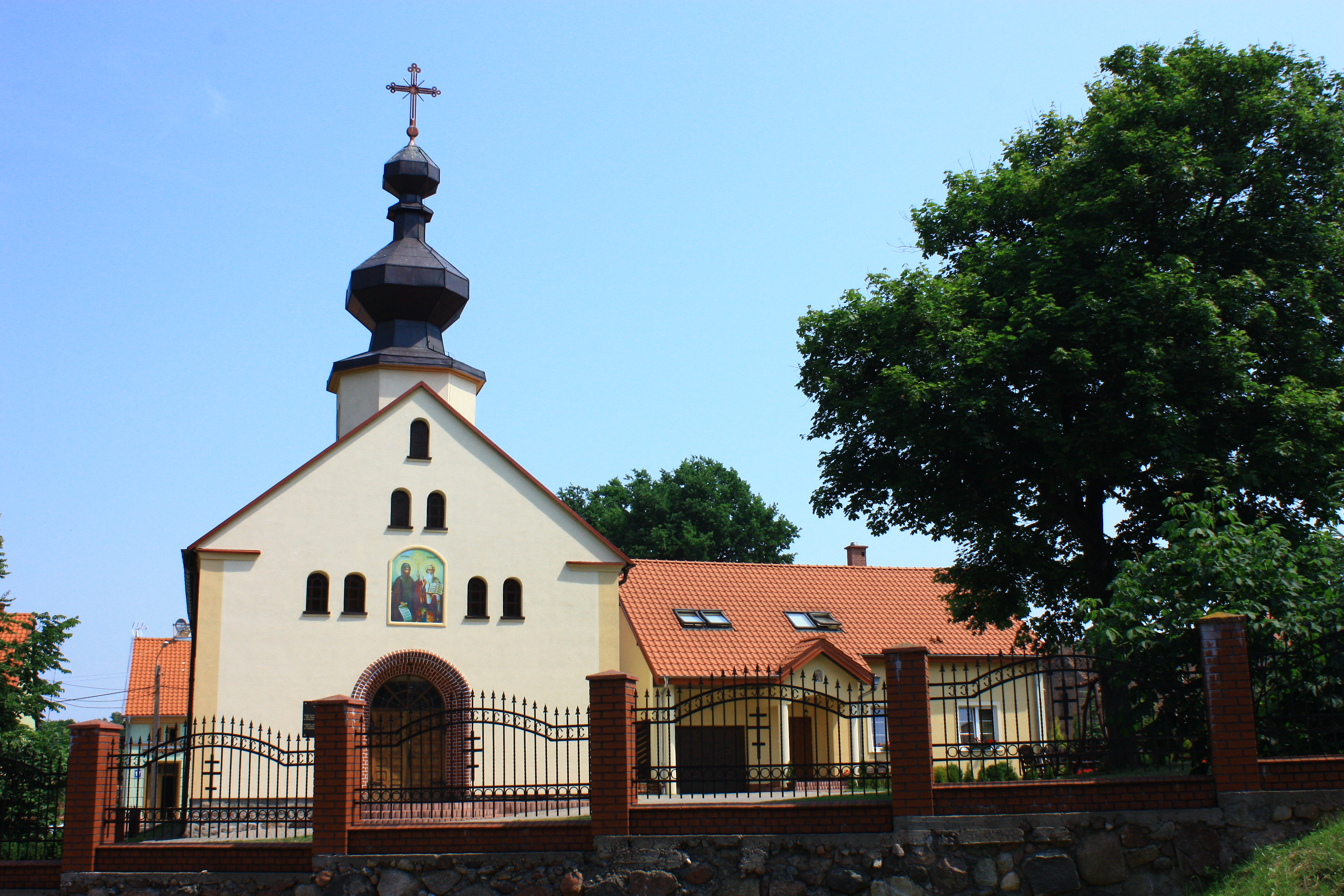 Lidzbark Warmiński, cerkiew greckokatolicka pw. Świętych Cyryla i Metodego